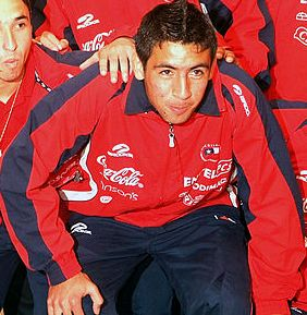 Mauricio Isla durante un encuentro entre la selección chilena sub-20 y La Presidenta de la República de Chile, Michelle Bachelet.